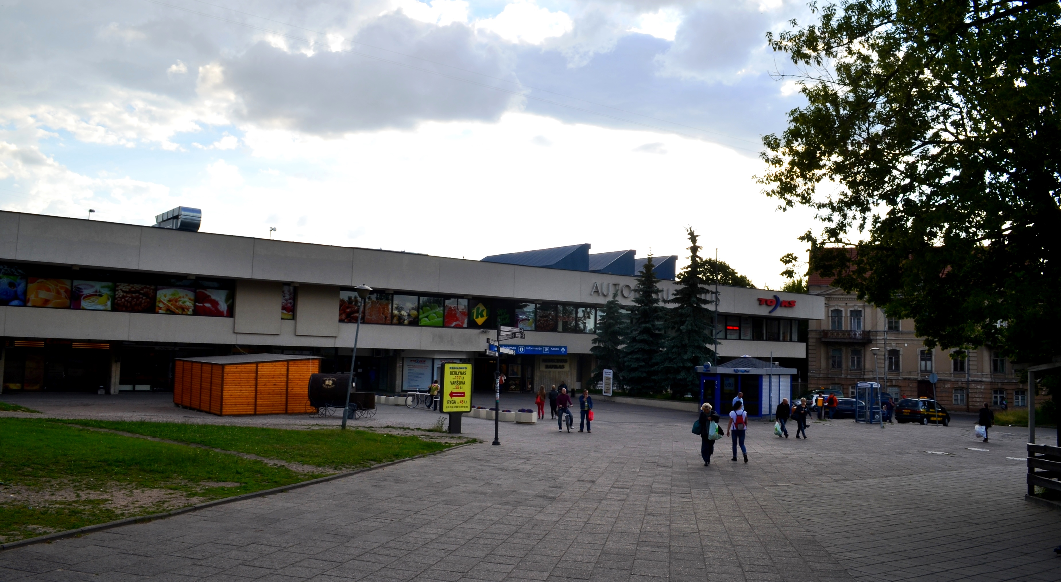 Vilniaus autobusų stotis